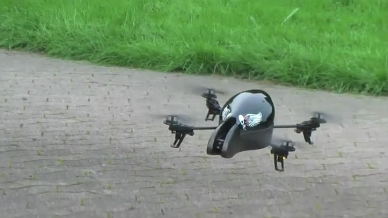 Ejemplo de un modding sencillo, pintura gloss y un par de autoadhesivos.